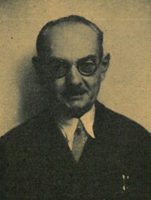 Benezet Vidal, écrivain auvergnat de langue occitane.